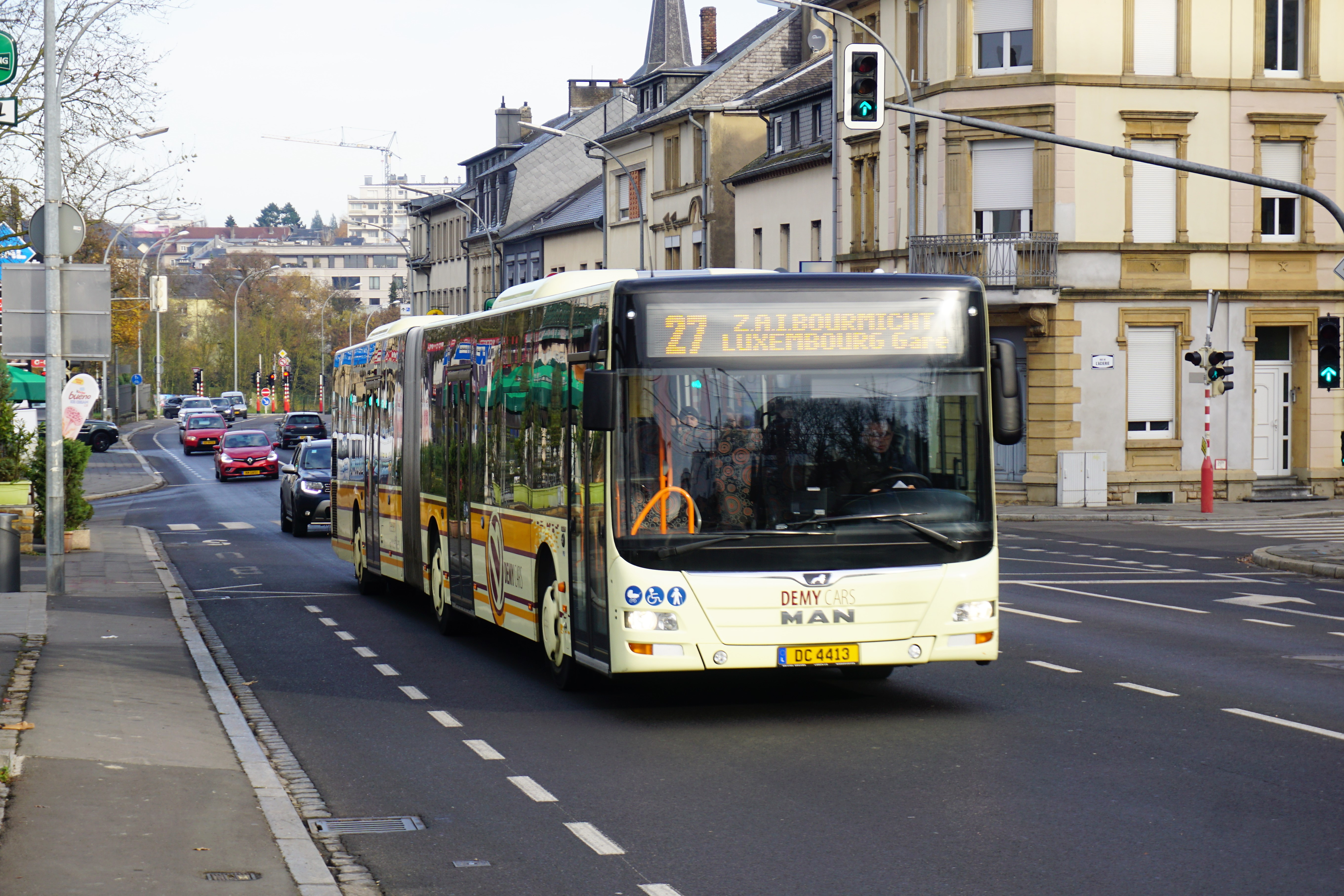 Luxembourg, bus "Demy Cars" (#DC4413) sur une ligne 27 déviée dans la route d'Esch.